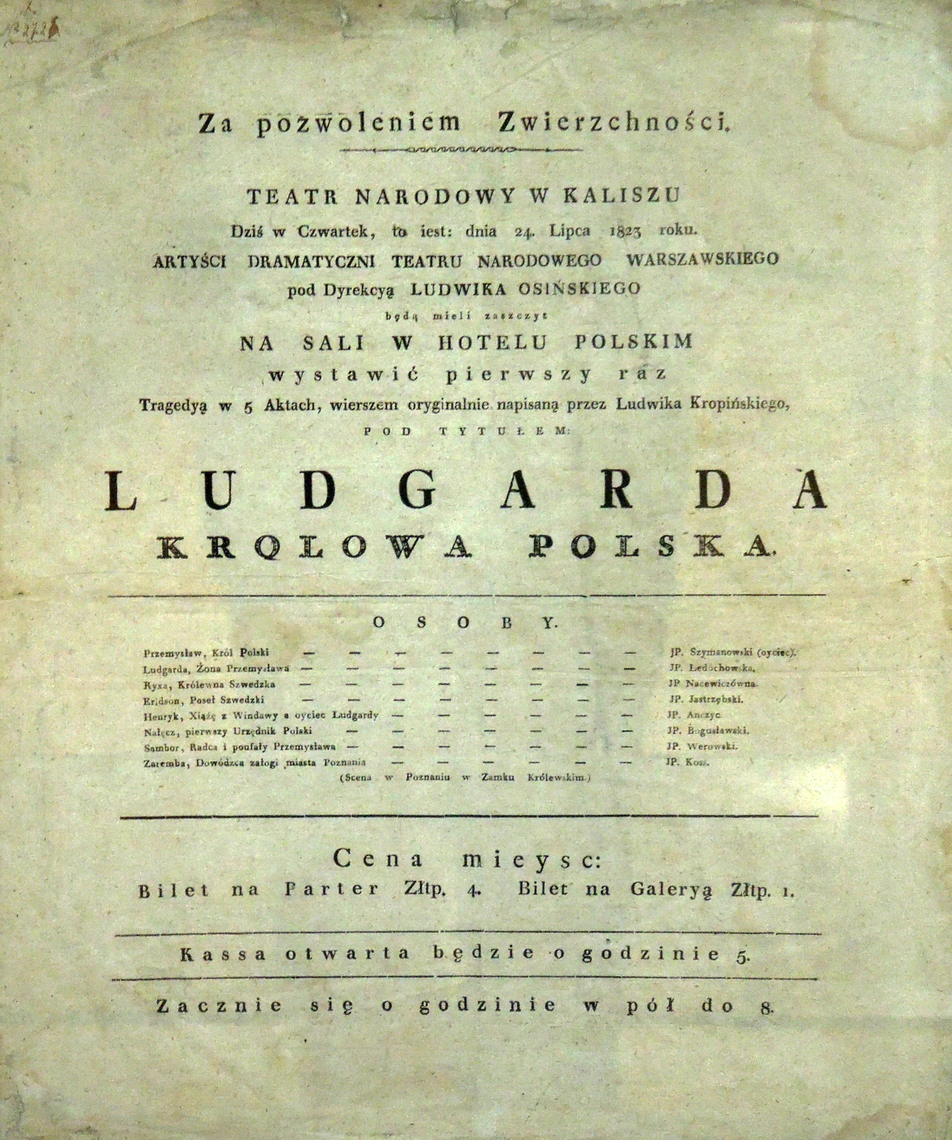 Ludwik Kropiński - Ludgarda, królowa polska; afisz teatralny